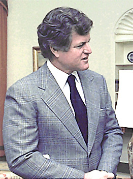 Bild Edward Kennedy von 1977